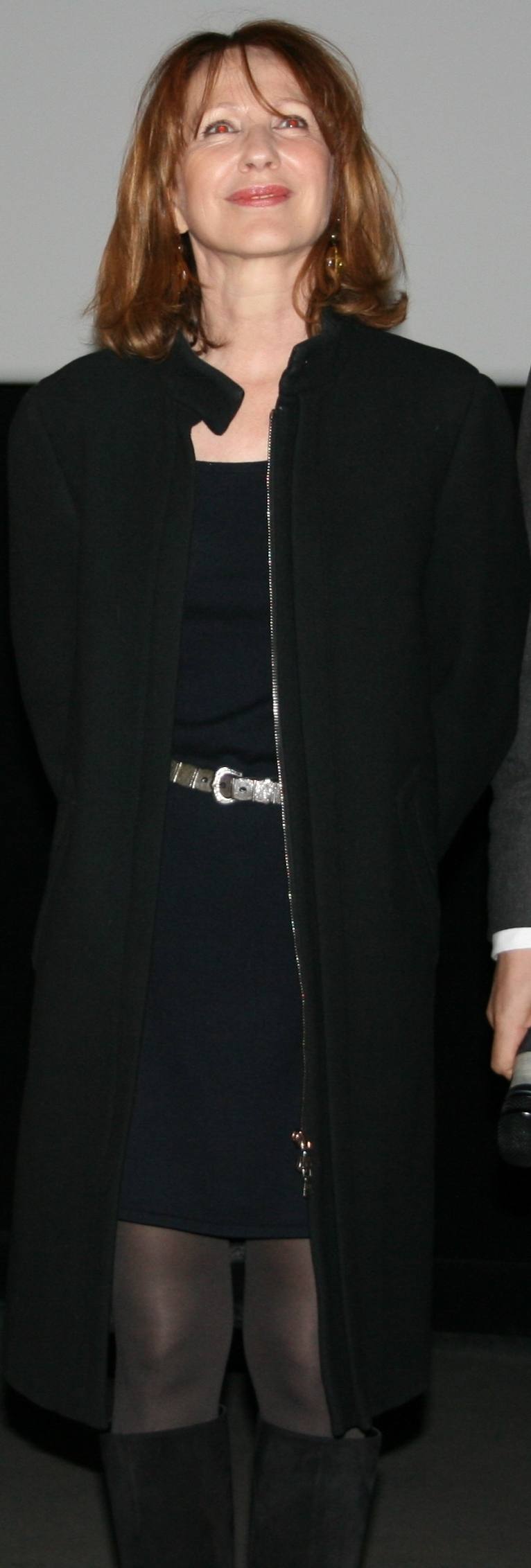 Nathalie Baye à l'avant-première de Passe-passe diffusée à l'UGC Ciné Cité Les Halles, à Paris.